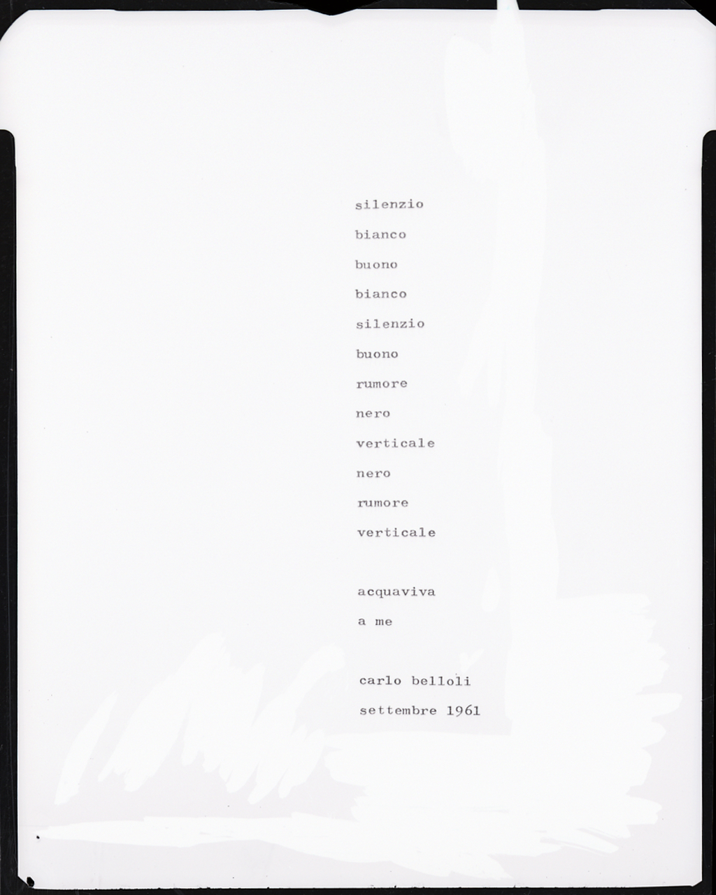 Servizio fotografico : Milano, 1963 / Paolo Monti. - Buste: 1, Fototipi: 3 : Negativo b/n, gelatina bromuro d'argento/ pellicola ; 10x12. - ((Serie costituita da 1 busta sciolta di negativi identificati con una doppia numerazione (42498): 24059. - La doppia numerazione potrebbe corrispondere ai lavori realizzati durante il periodo di attività del laboratorio e studio fotografico "Foto Studio 22", società che risulta essere stata aperta il 10/04/1961, con partecipazione, nel ruolo di gerente, di Vincenzo Carrese. - Fonte: Rubrica di Paolo Monti: Archivio fino 1-4-1961/ 31-3-1963 (1961-1963), presso Archivio Paolo Monti